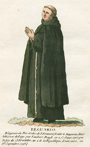 Collection de costumes de tous les ordres monastiques, supprimés à differentes époques, dans la ci-devant Belgique, Bruxelles, Philippe Joseph Maillart et sœur, 1811